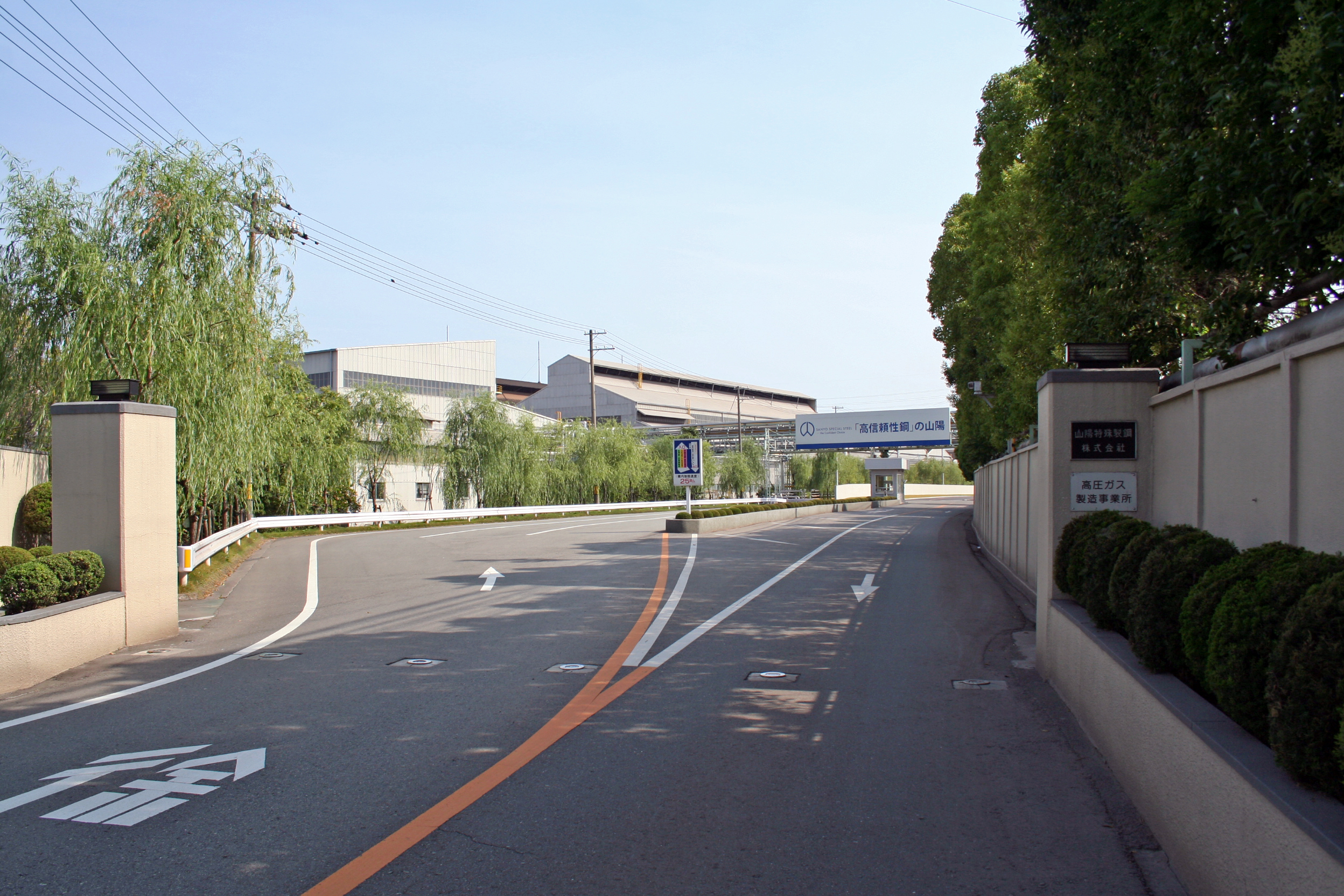 姫路市飾磨区にある山陽特殊製鋼の北側正門。